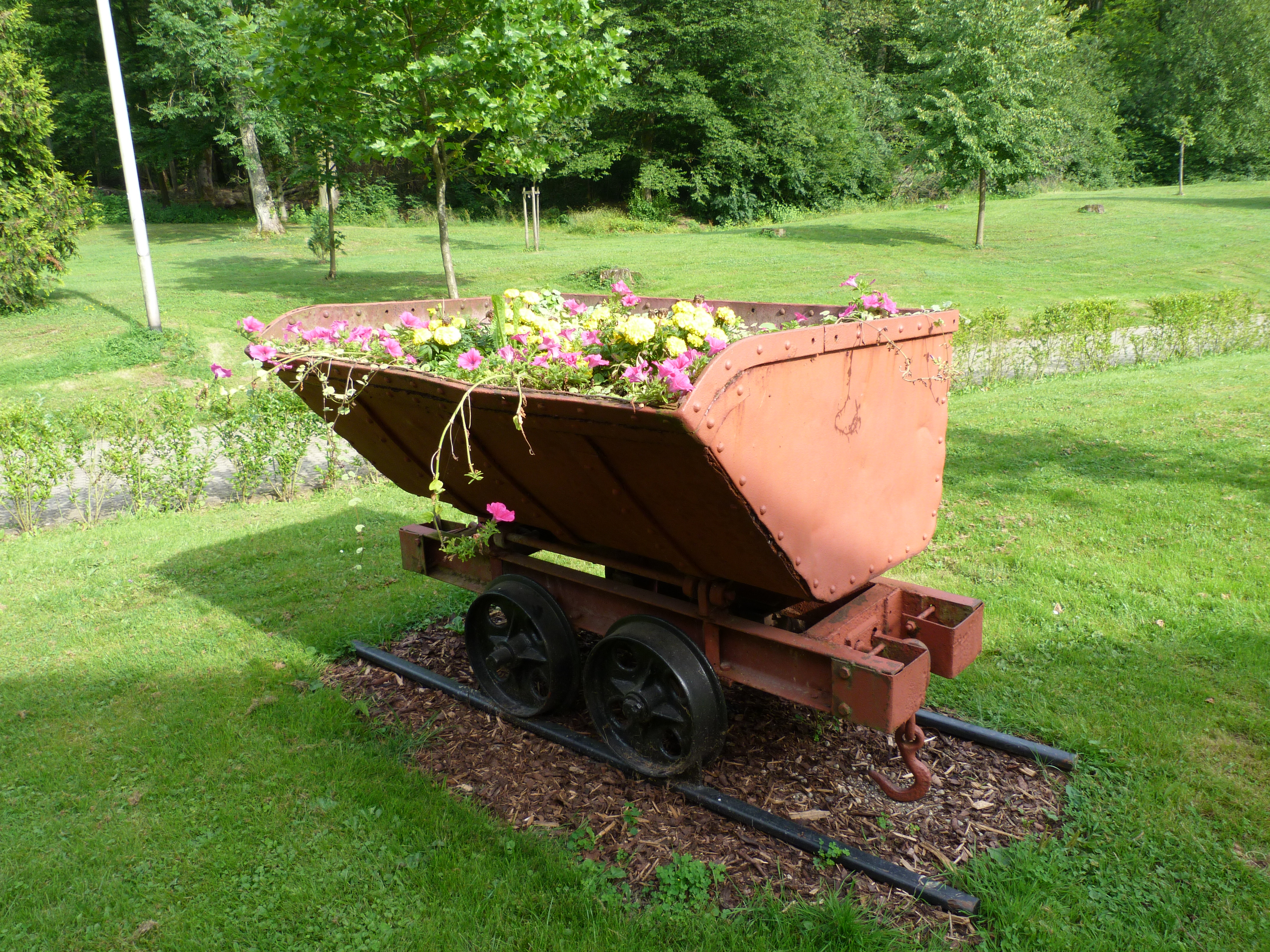 Charriot au Joli-Bois (Athus)